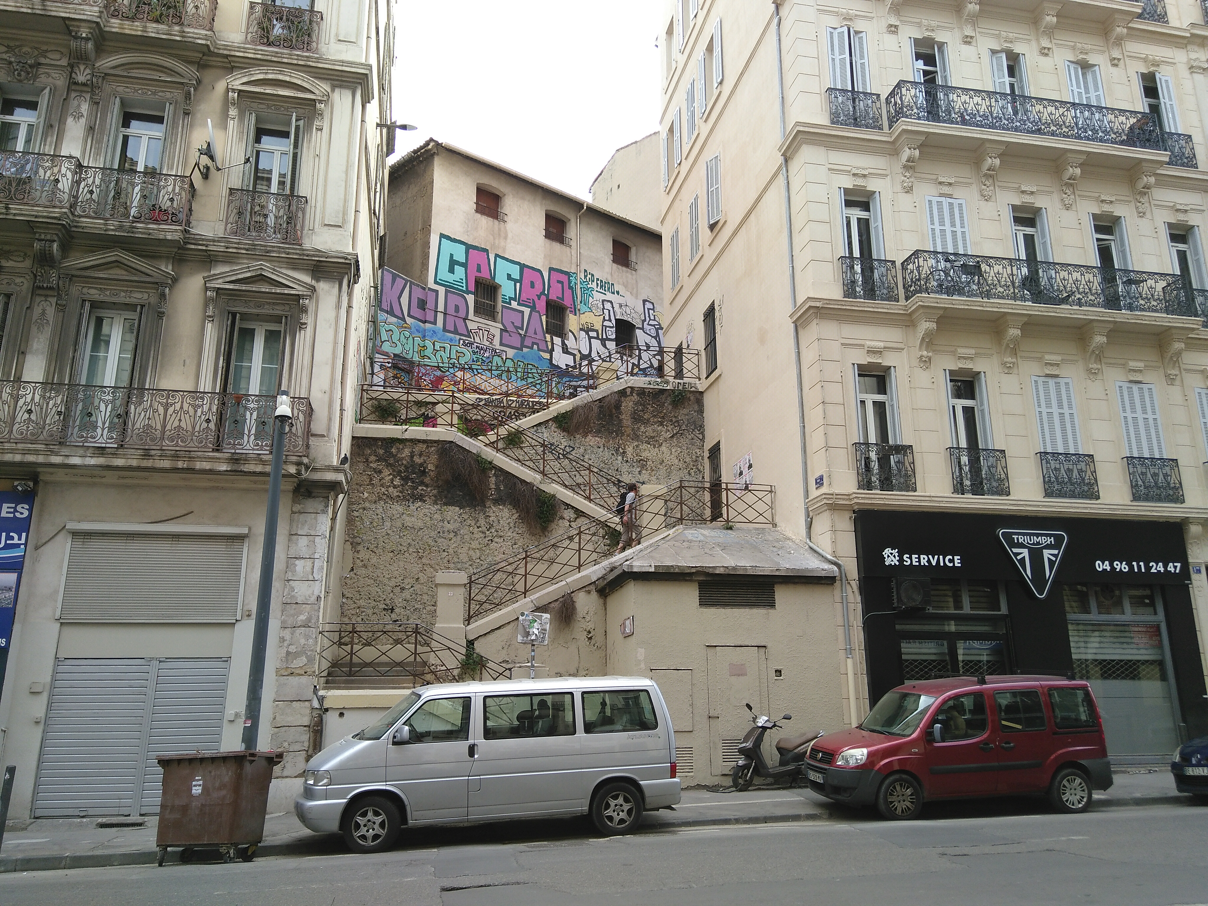 Escalier construit vers 1864 lors du percement en tranchée du cours Lieutaud